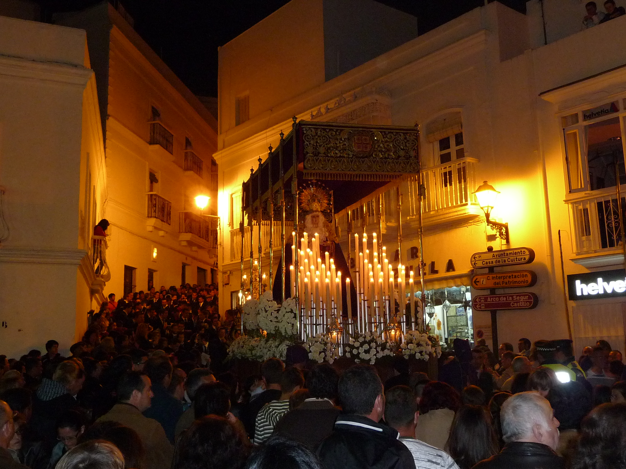 SemanaSanta-Vejer-p1020203.jpg